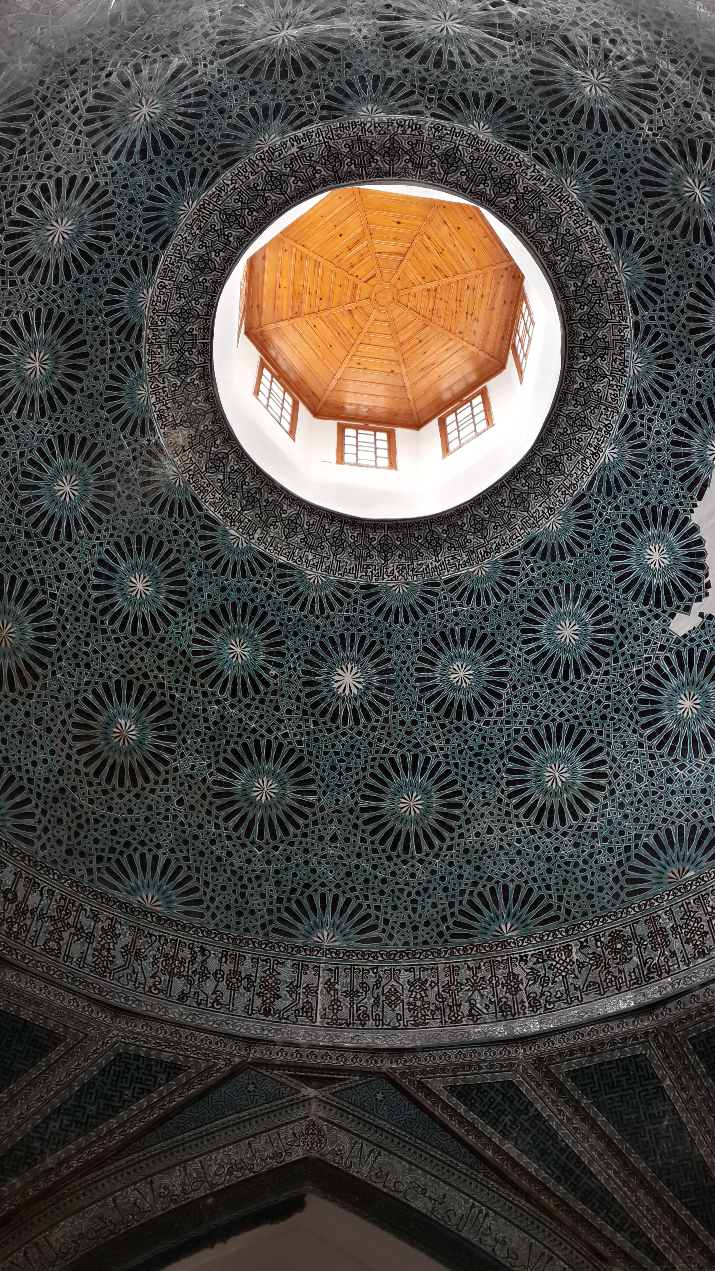 karatay medresesi müzesi kubbesi içi